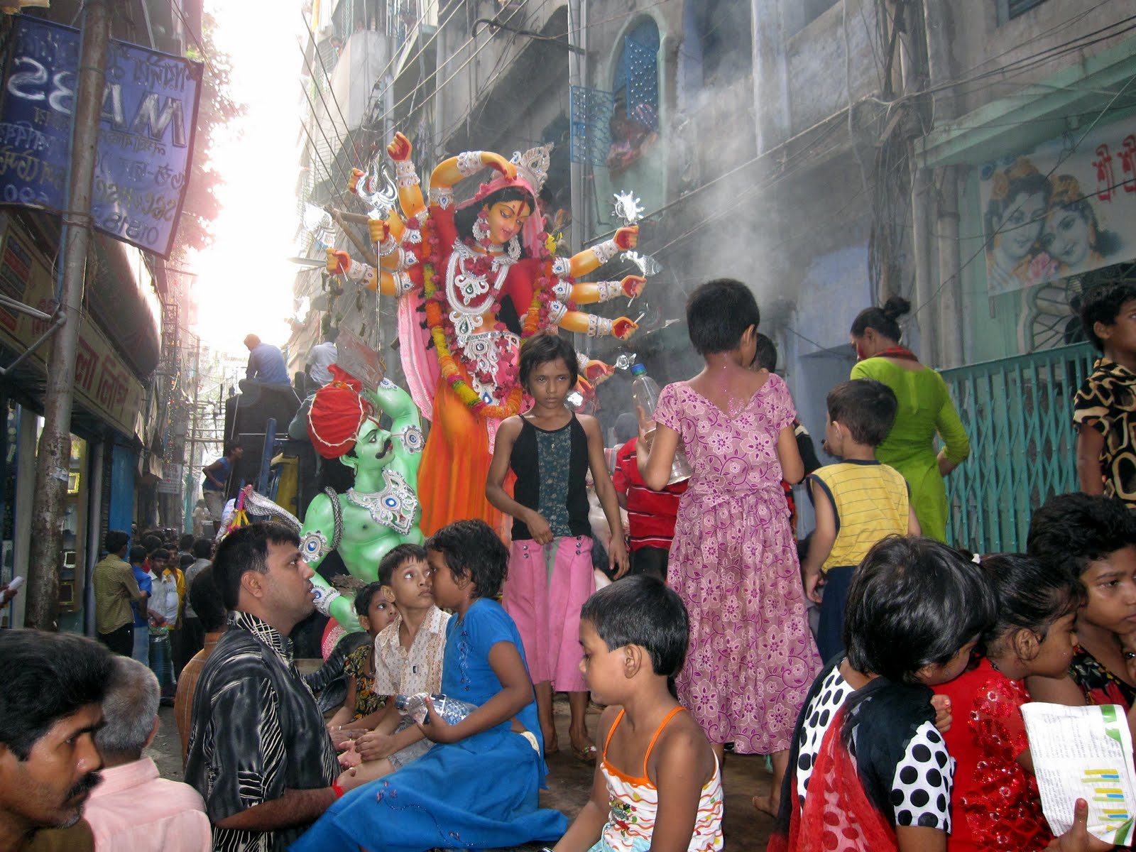 Dhaka Durga Puja procession 2009